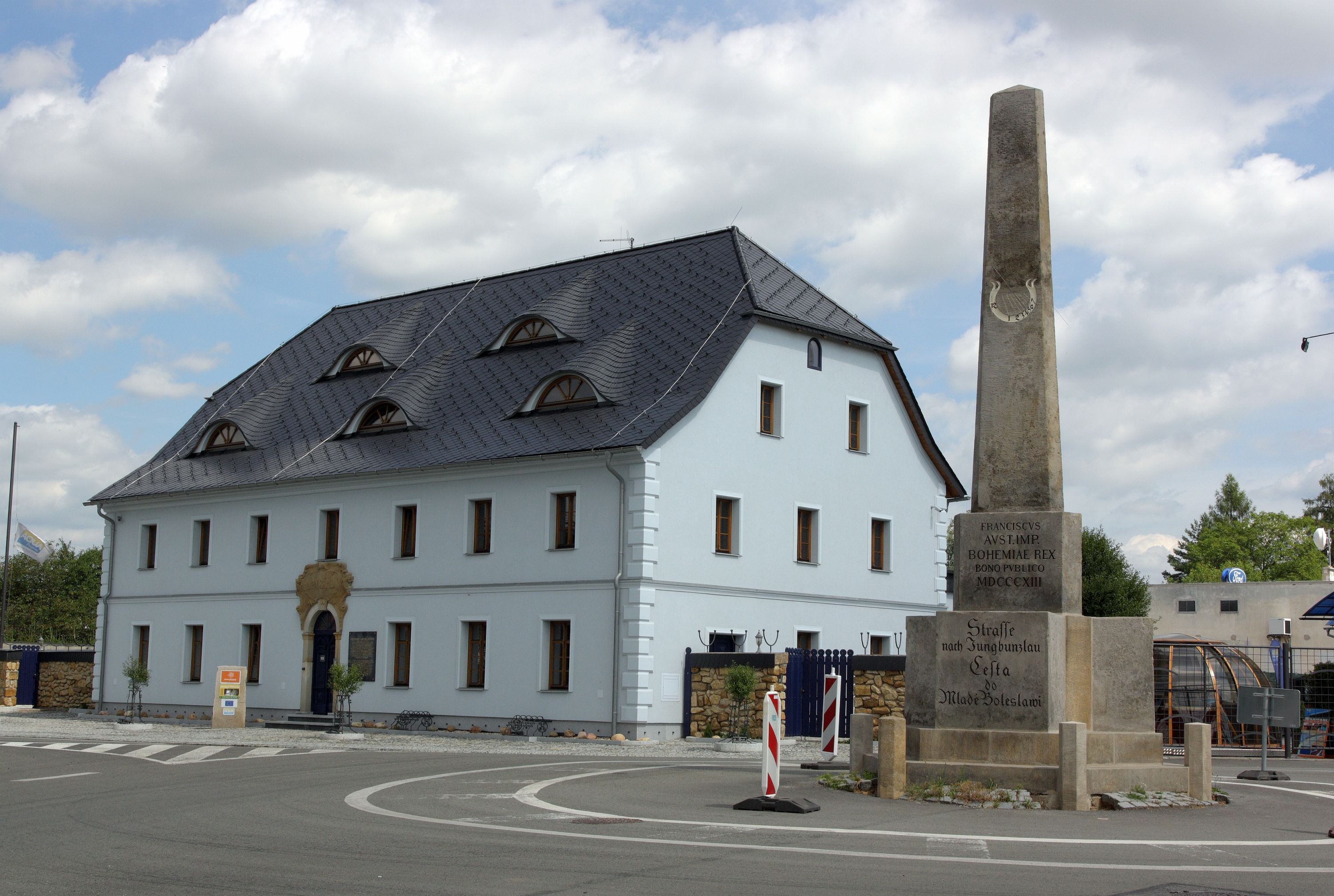 Ohrazenice - bývalý zájezdní hostinec „u Pyrámu” a kamenný rozcestník státních cest z roku 1813.